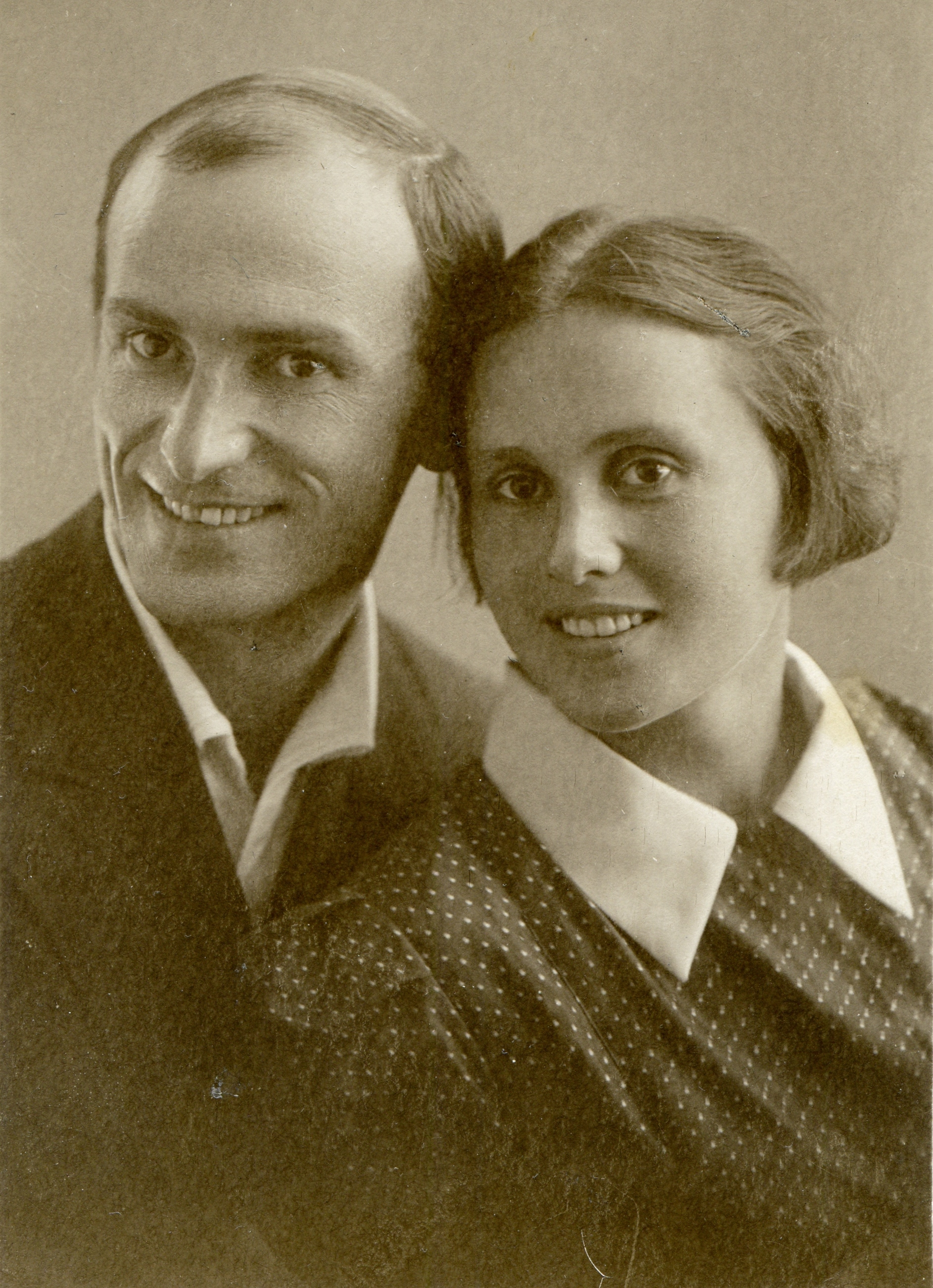 Архитектор Алексей Маркович Дукельский с будущей женой Надеждой Петровной Дукельской (в 1-м браке Абатуровой, в девичестве Лукиной). Свердловск, июнь 1937г. Фото из семейного архива